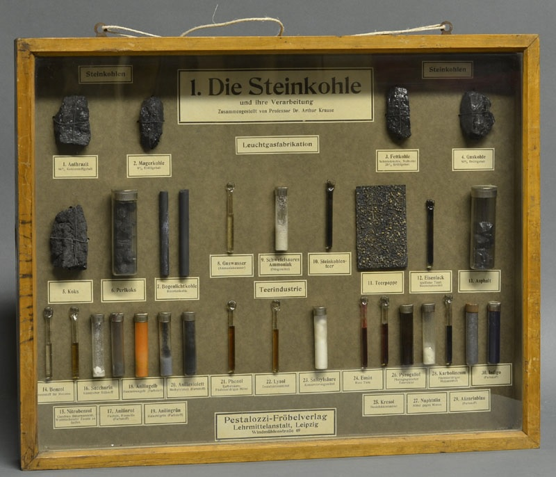 Schaukasten zur Verarbeitung von Steinkohle